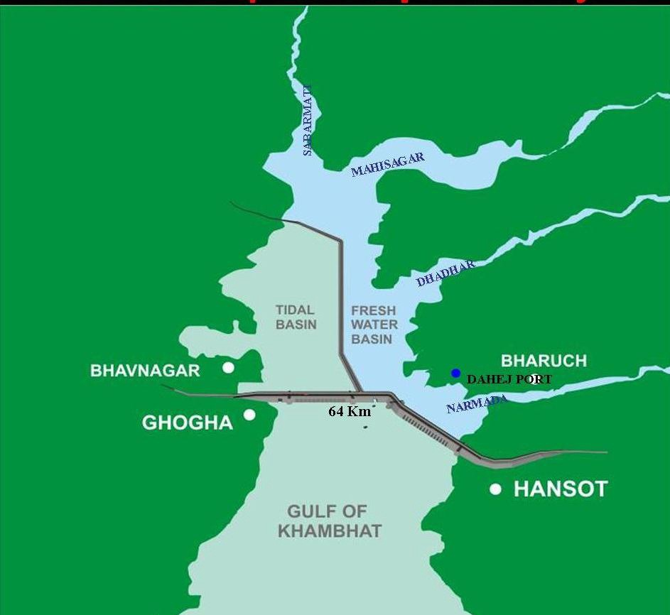 ગુજરાતી: સૂચિત ભરતીજન્ય વિદ્યુત યોજના